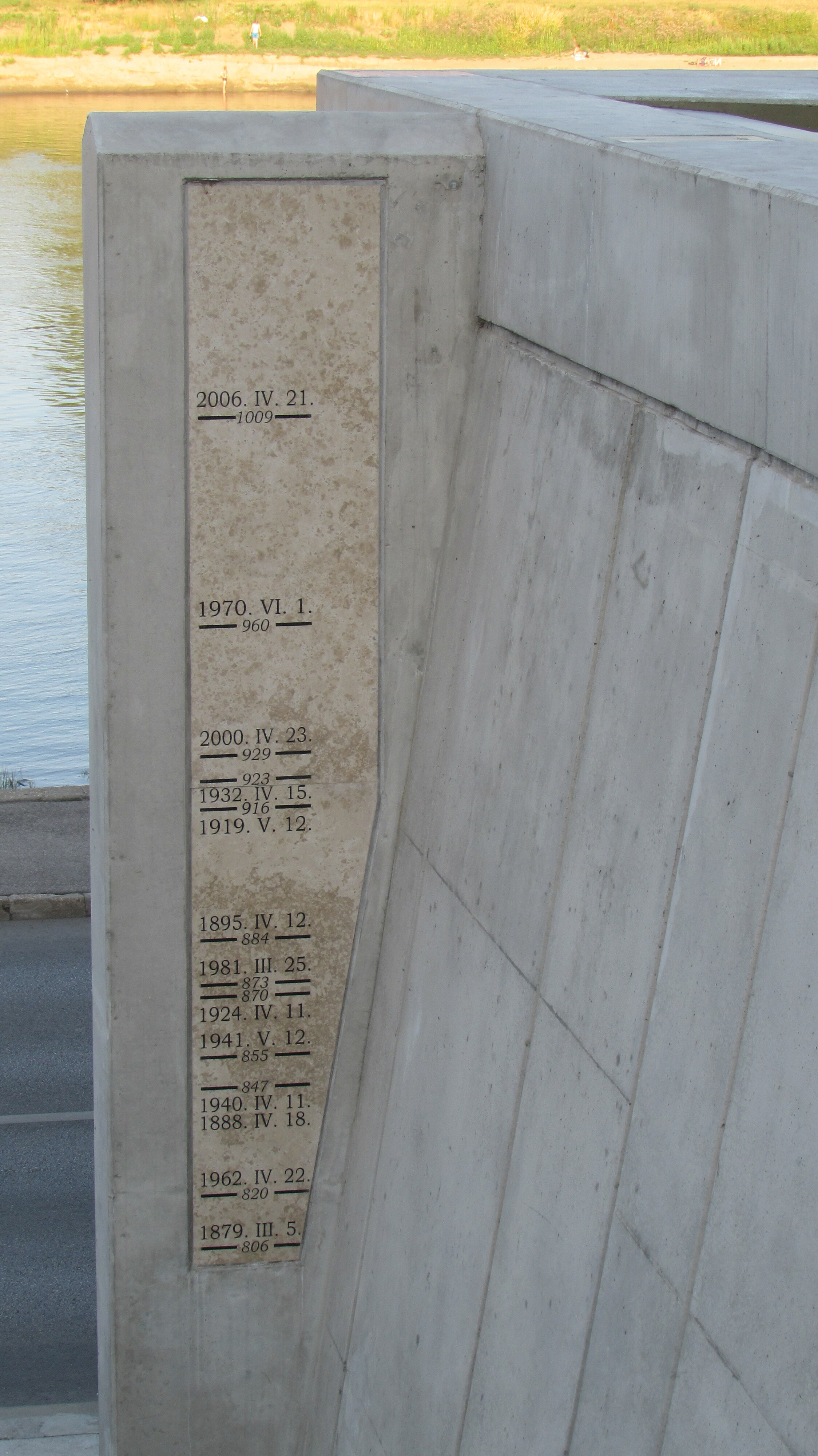 Szeged Theiß Wasserstand